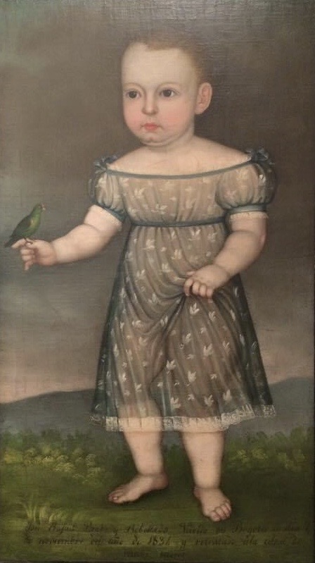 Retrato del poeta colombiano Rafael Pombo en su infancia